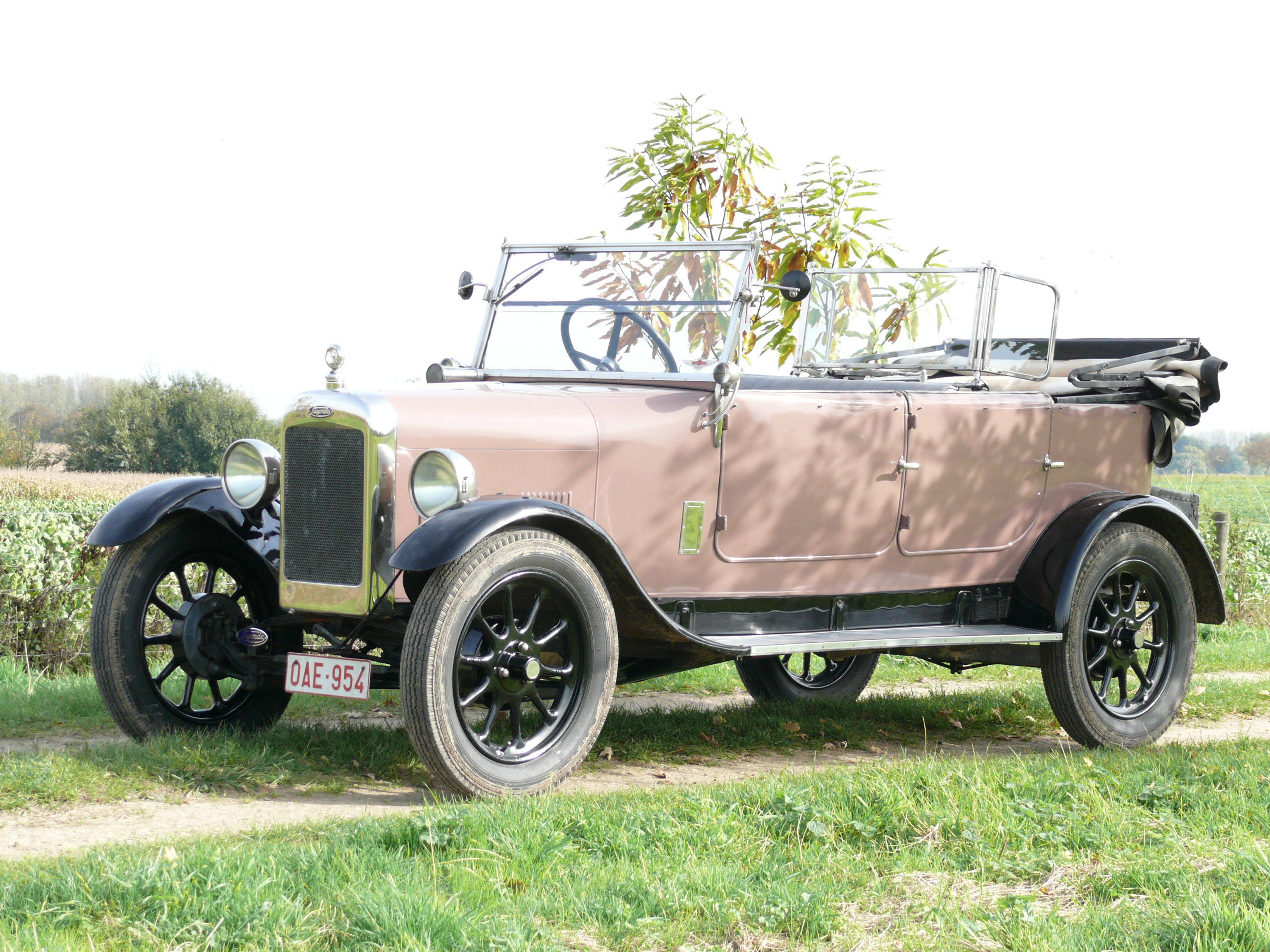 Lagonda 12/24LC tourer 1925 LC indicates this car is a tourer and has a monocoque construction. The saloon 12/24 S has a separate chassis as some of the later models. All 12/24 cars were build with a factory body.